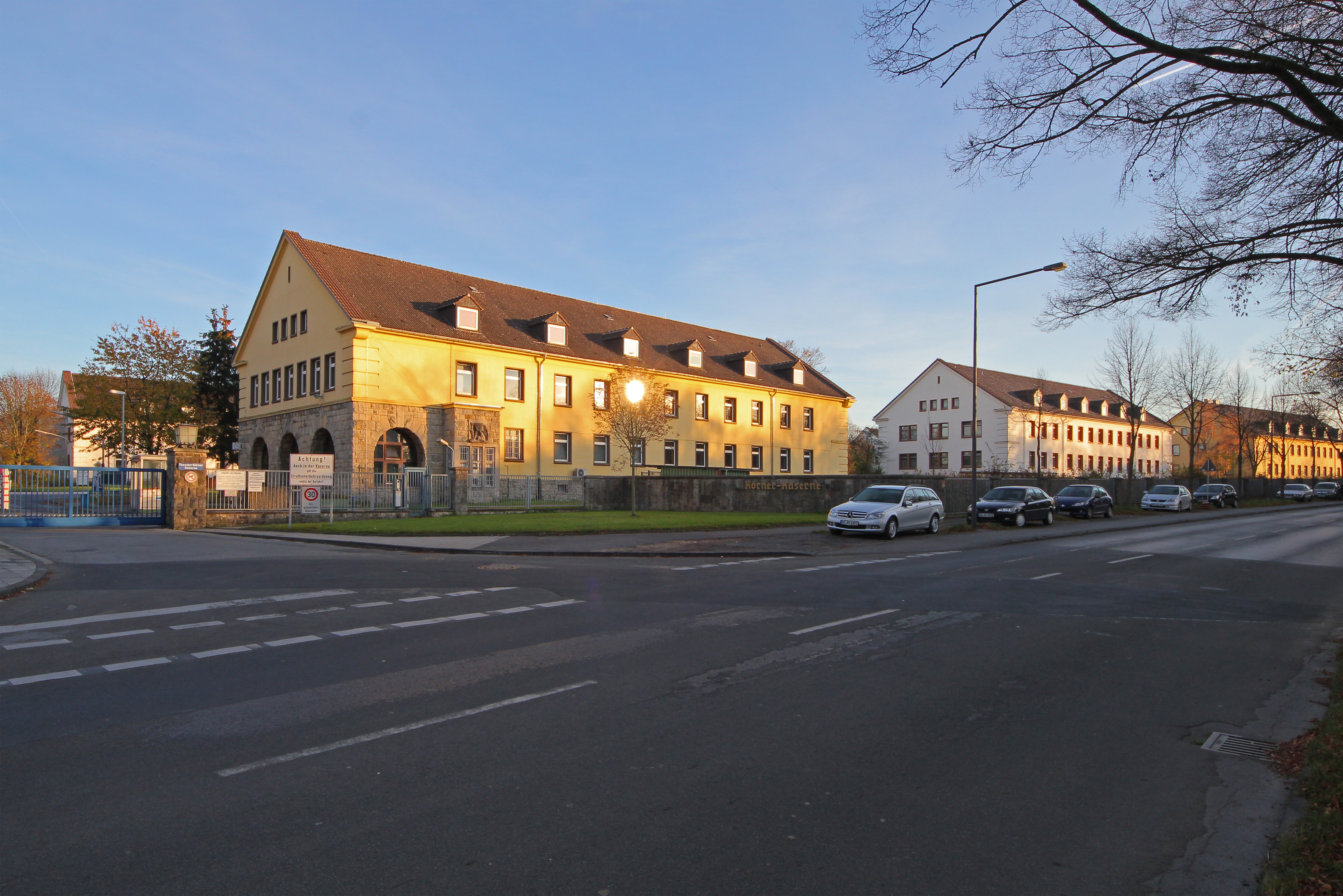 Theodor-Körner-Kaserne (Teilansicht von außen) in der Lintertstraße, Aachen, NRW